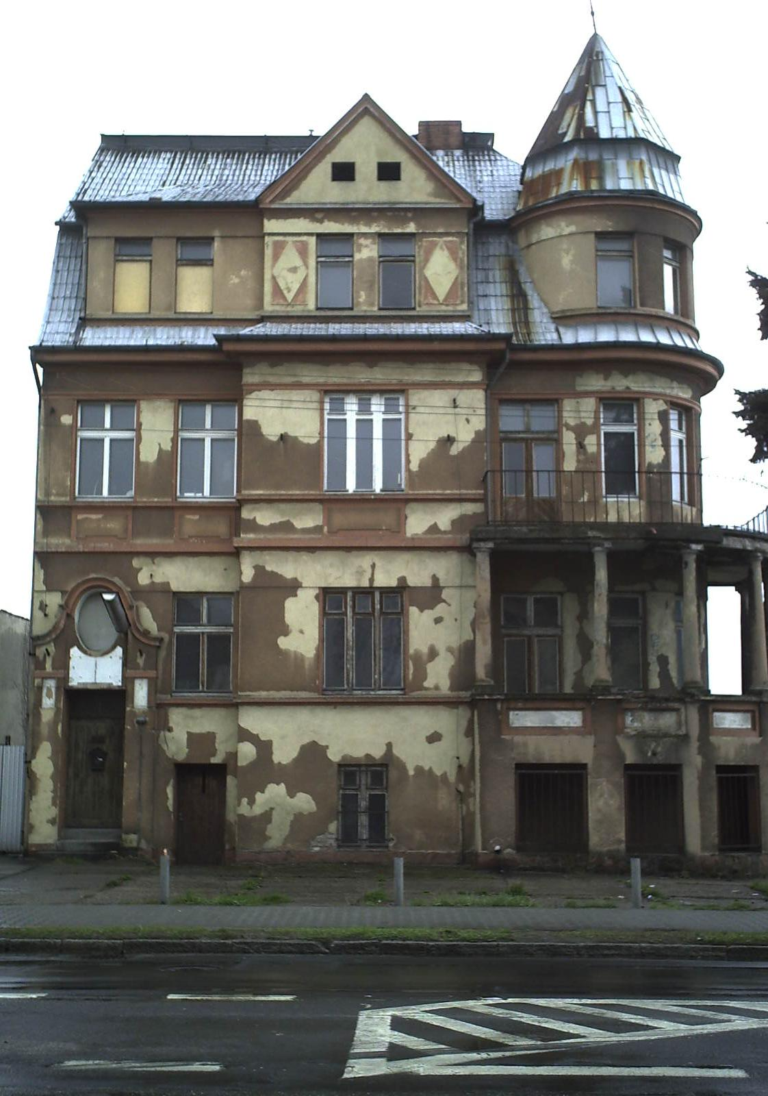 Old house in Skwierzyna (lubuskie voivodship), Poland.